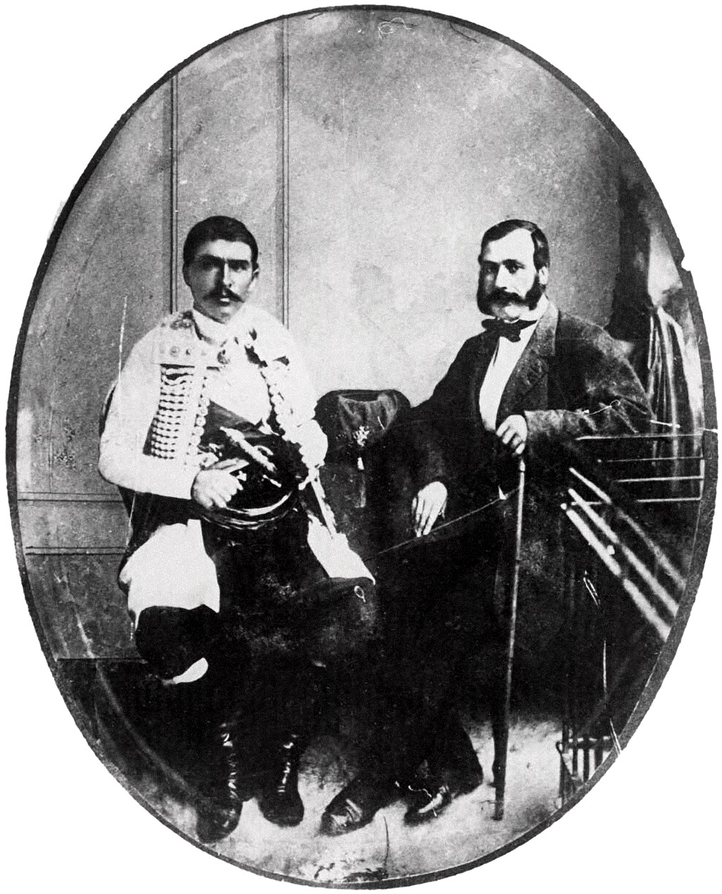 Джуро Матанович и Георги Раковски, Сърбия, 1861